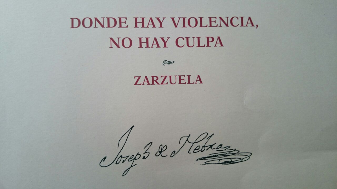 Es la imagen de uno de los títulos famosos de zarzuela del compositor José de Nebra.